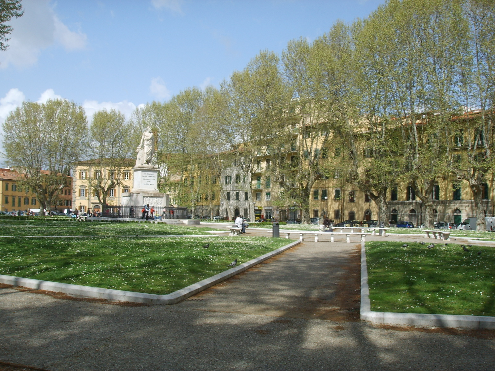 Monumento al granduca Pietro Leopoldo I in Pisa, Piazza Martiri della Libertà (Piazza Santa Caterina)